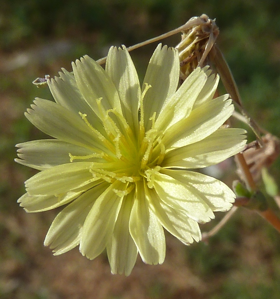 Lactuca serriola (Serrallones) : Flor - Calle del Compositor Manuel Berná García, Albatera (Alicante, España).